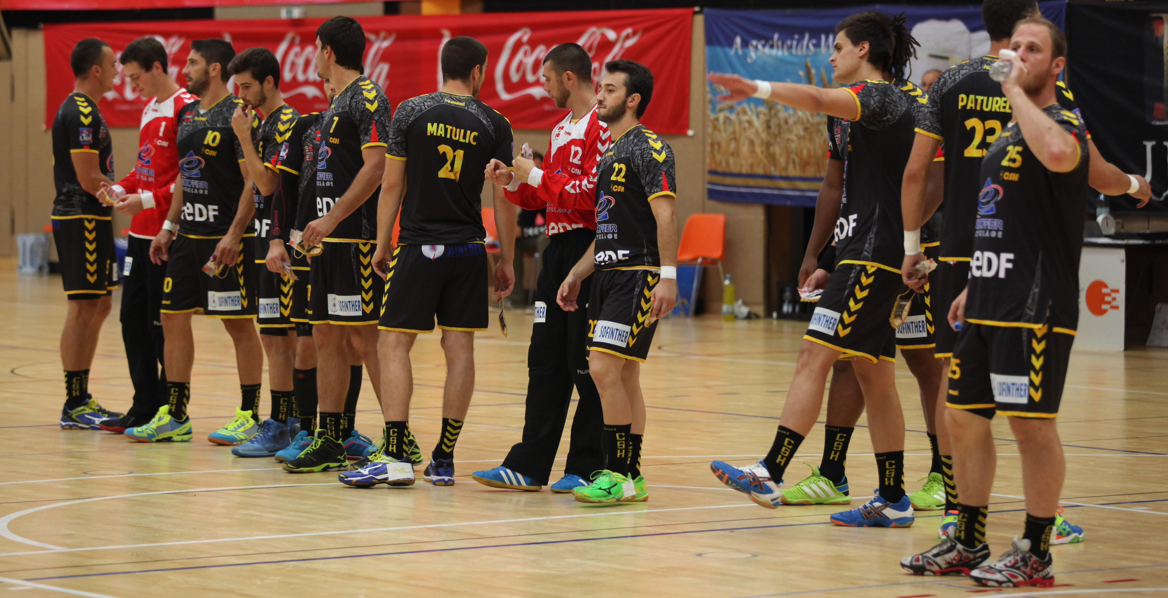 Die Mannschaft von Chambéry Savoie Handball am 16. August 2014 beim Sparkassen-Cup in Ehingen.